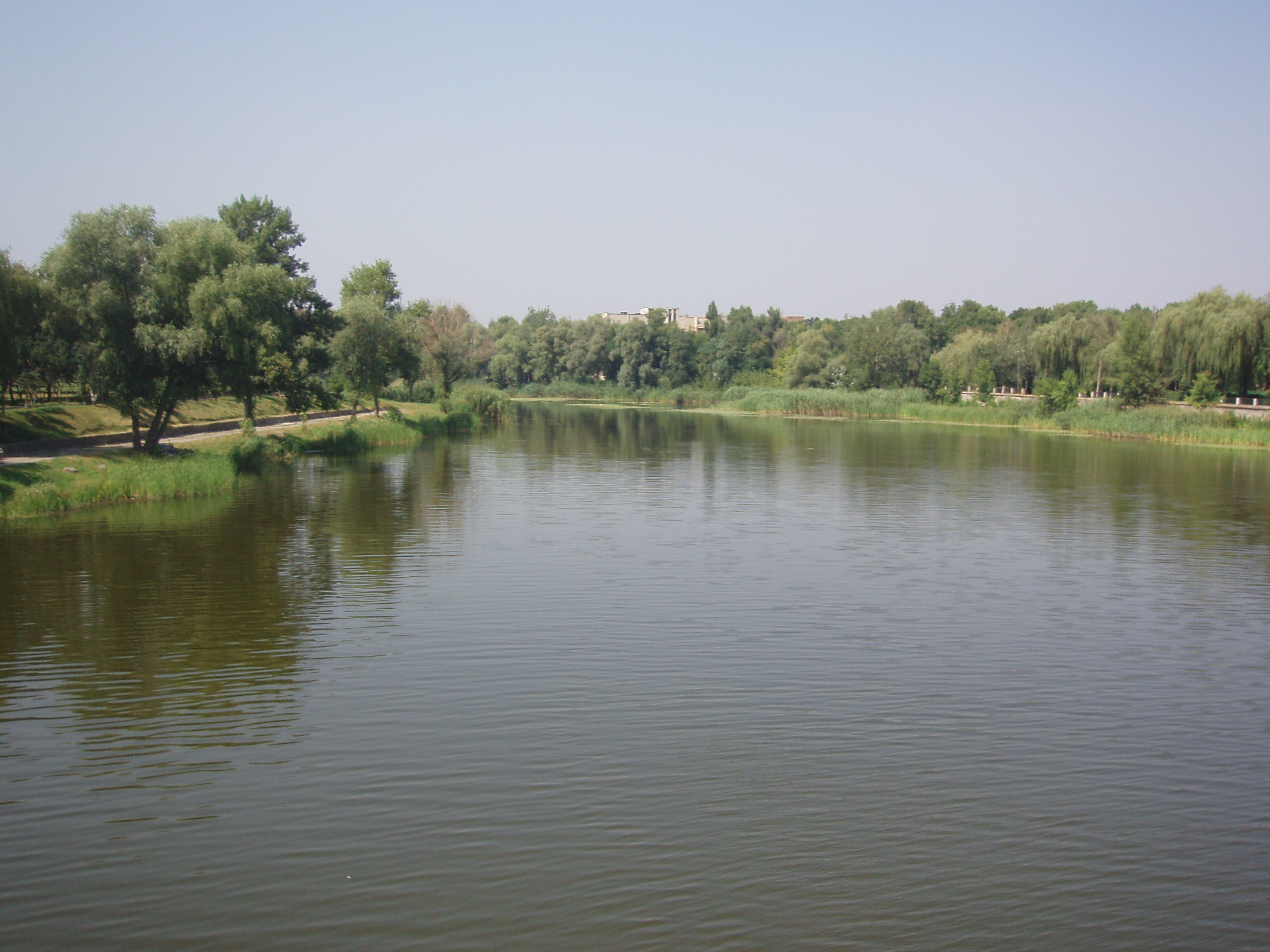 Річка Хорол в м. Миргороді (Полтавська обл.), 2008